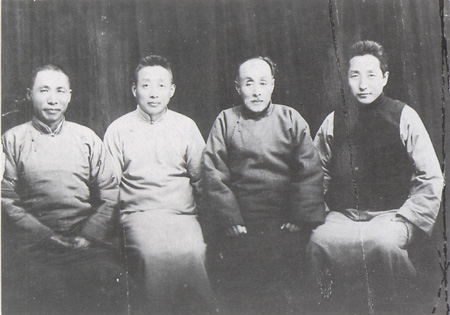 가흥 피난처(좌로부터 김구, 진동생, 이동녕, 엄항섭) 1933